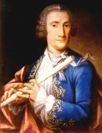 Johann Joachim Quantz jouant de la flûte